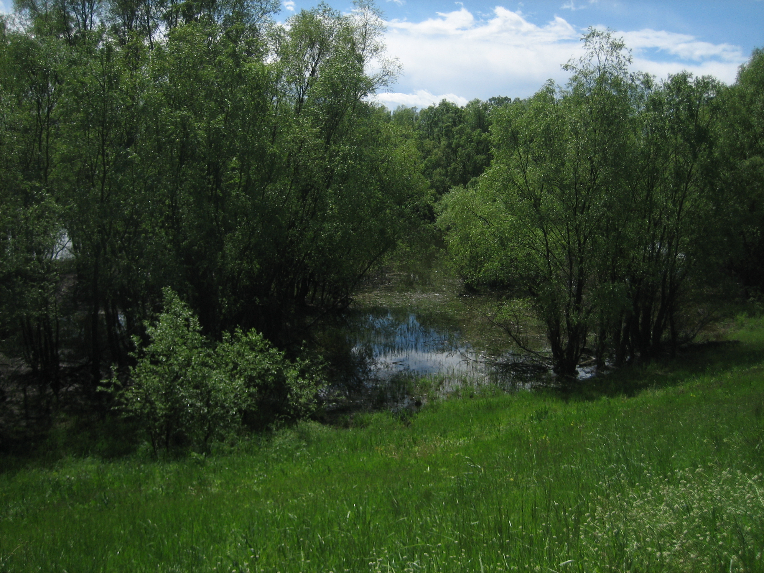 Kopački rit, a nature park in Baranja, eastern Croatia / Park prirode Kopački rit u Baranji.